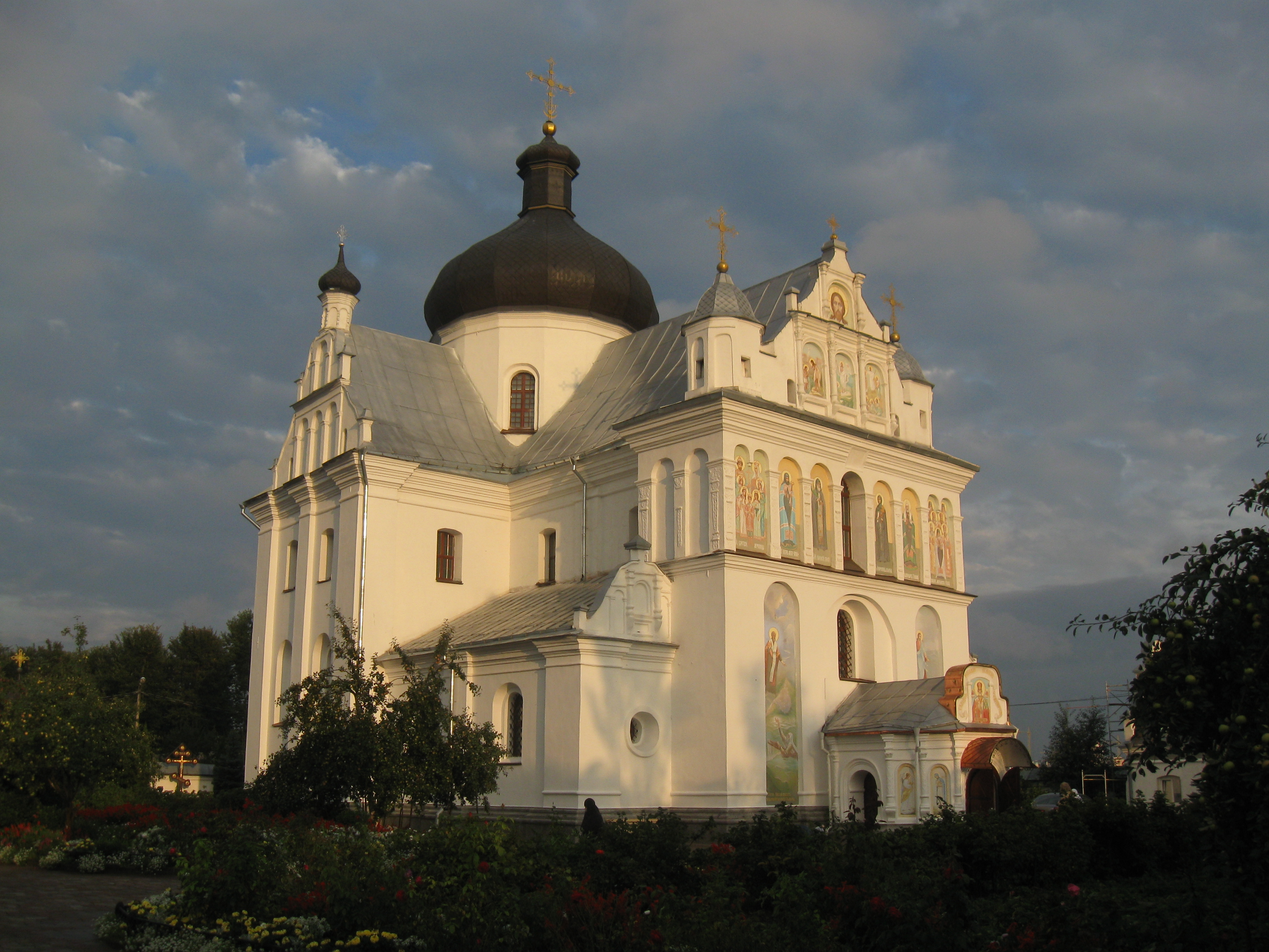 Беларуская (тарашкевіца): Комплекс Мікольскага манастыра ў межах агароджы:званіцажылы дом (шпіталь) Мікольская царквадэкаратыўнае аздабленьне царквы: фрэскі сюжэтныя, фрэскі арнаментальныя, іканастас, арнаментальная ляпнінаАнуфрыеўская царкваагароджа з уязной брамай. г. Магілёў This is a photo of Belarusian heritage monument. Reference number: 511Г000017 ( WLM)